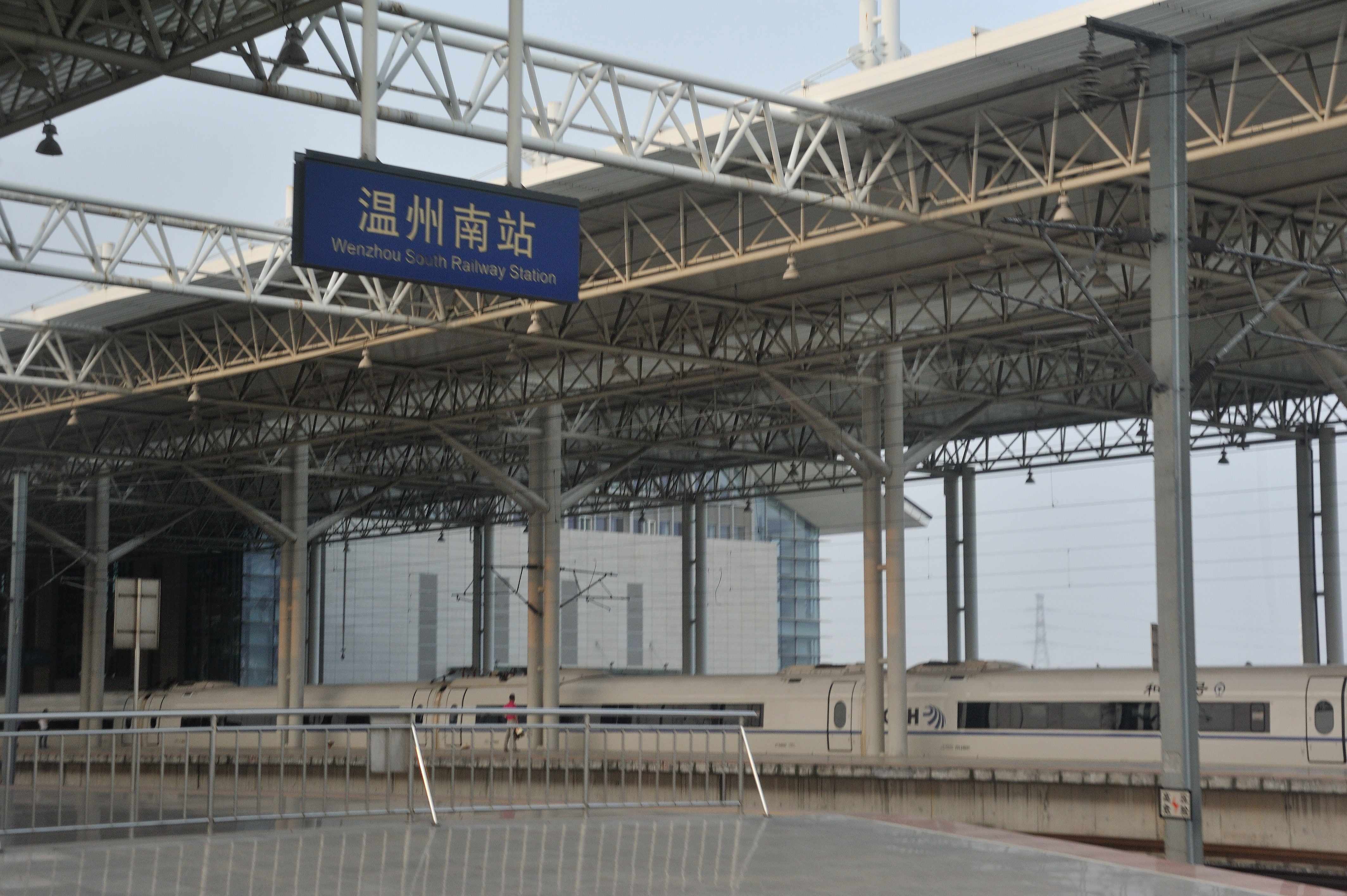 温州南站，2014年6月